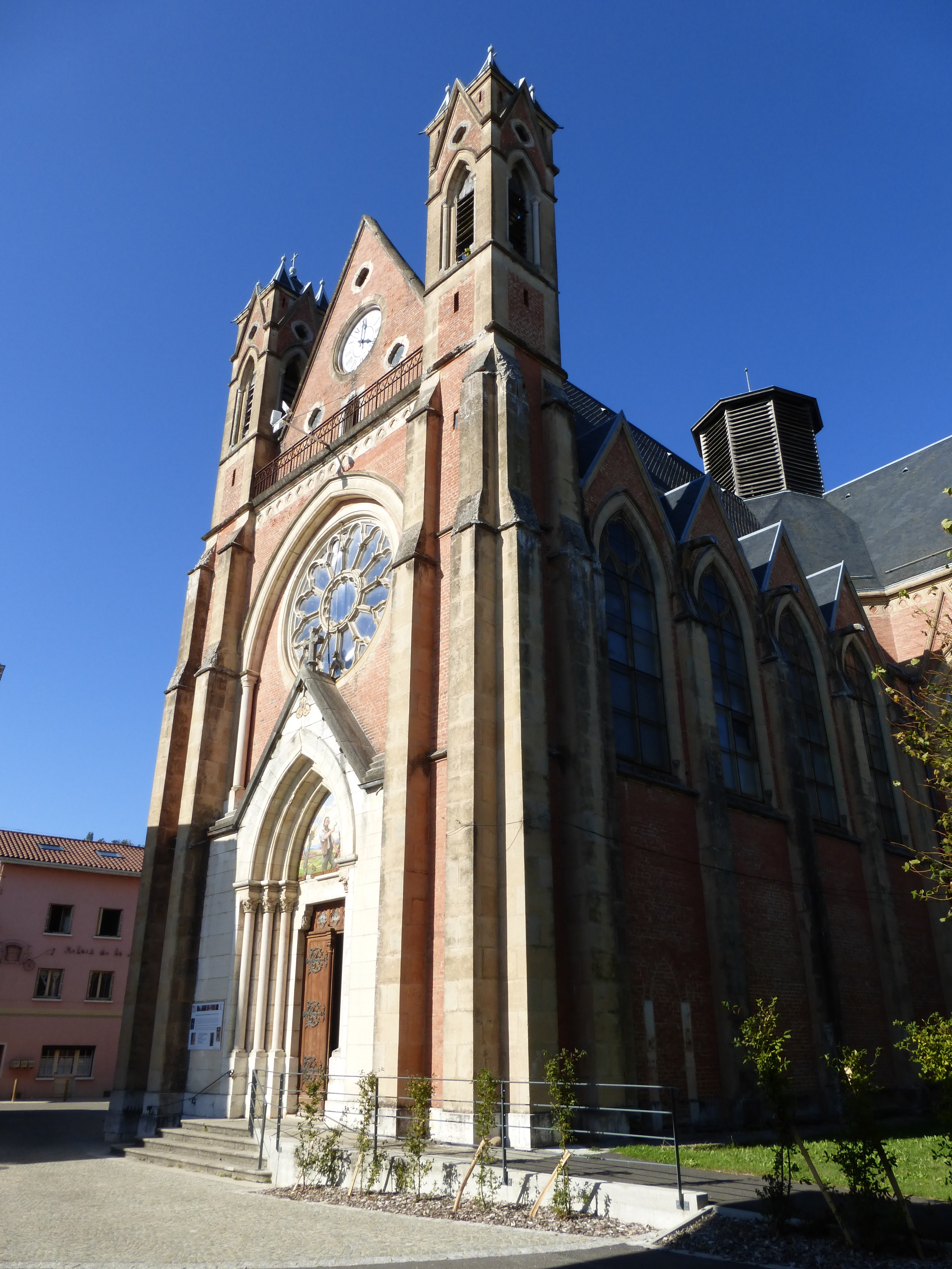 Basilique de Notre-Dame-de-l'Osier (Isère, France). Septembre 2016